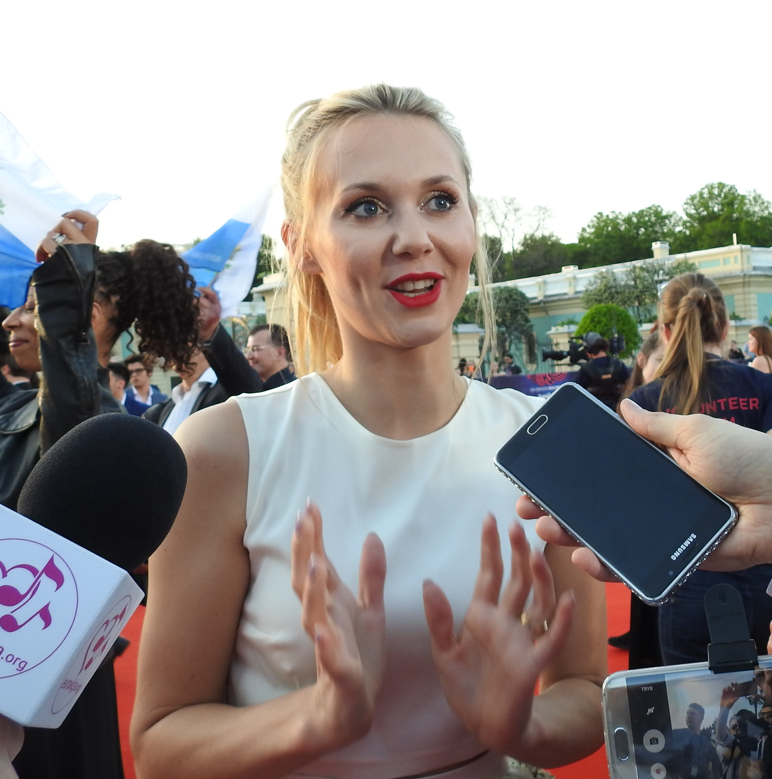 Polska piosenkarka Kasia Moś w maju 2017 roku.